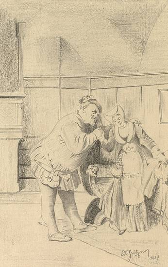 Falstaff macht dem Burgfräulein Komplimente, 1884, pencil on paper, 16,5 x 11 cm